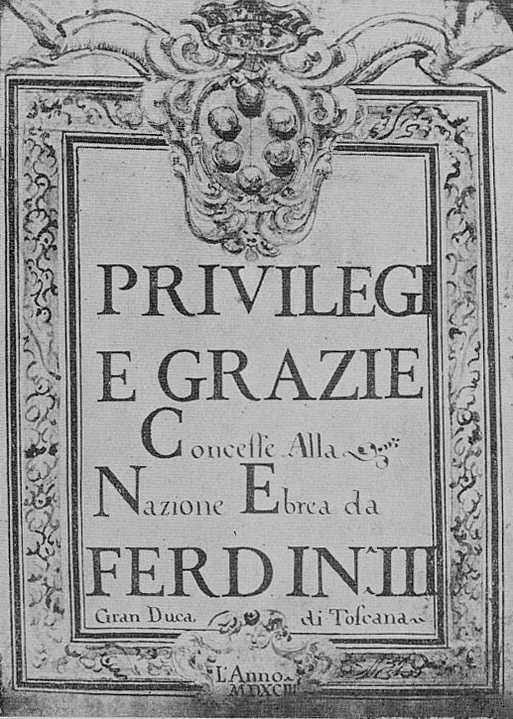 Leggi Livornine